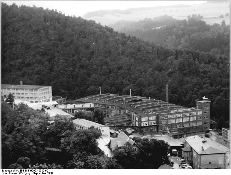 Zentralbild-Thieme 23.9.68 Karl-Marx-Stadt: VEB DKK Scharfenstein -hier entstehen alle in der DDR produzierten Haushaltskühlschränke. Wir bitten, dieses Foto im Zusammenhang mit Motiv G0923/13/1n vom 23.9.68 zu verwenden!